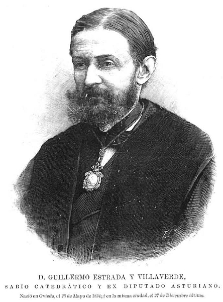 Retrato de Guillermo Estrada y Villaverde, publicado en la revista española La Ilustración Española y Americana.